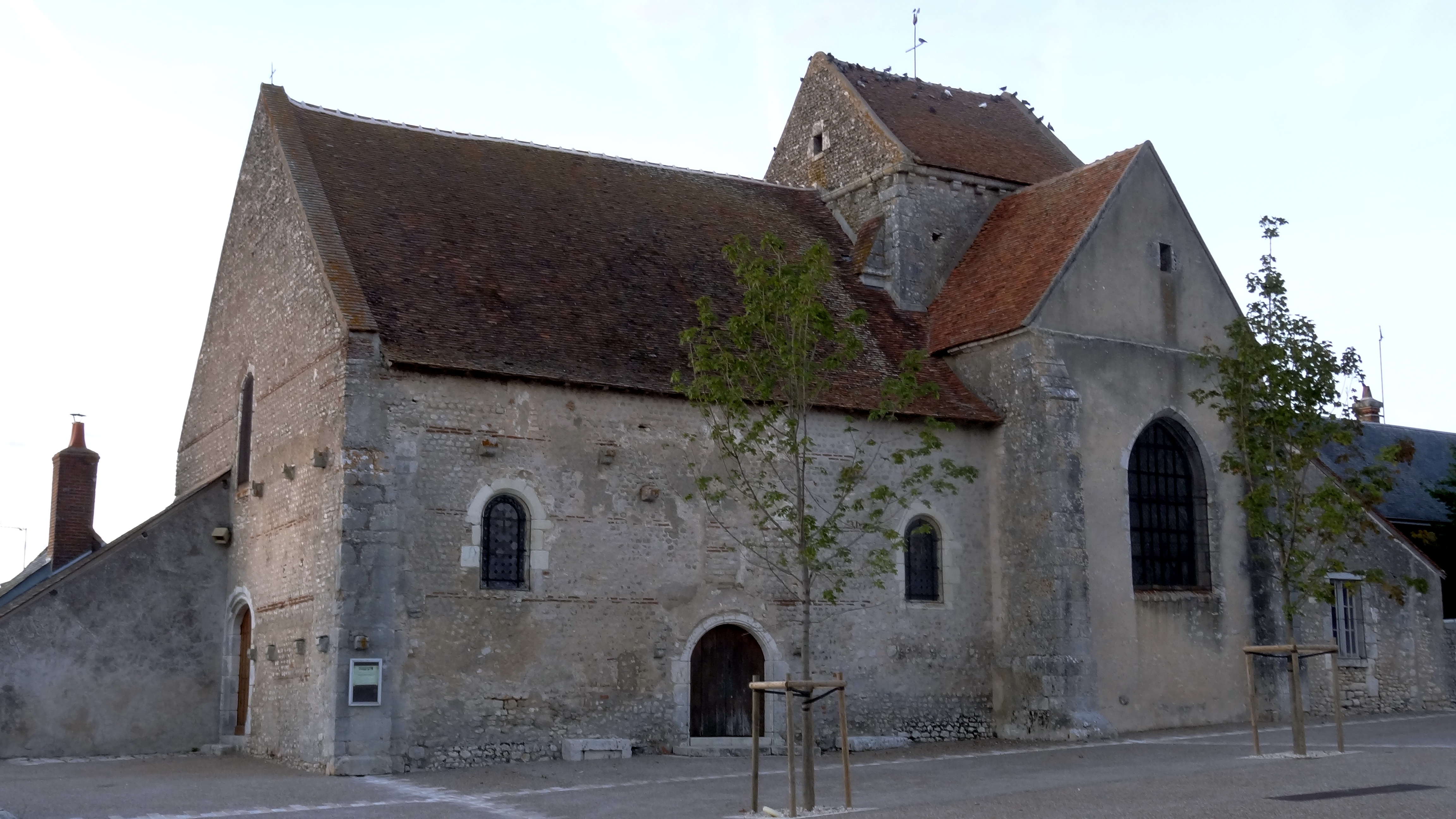 Église Saint-Lubin d'Averdon, Loir-et-Cher, France .